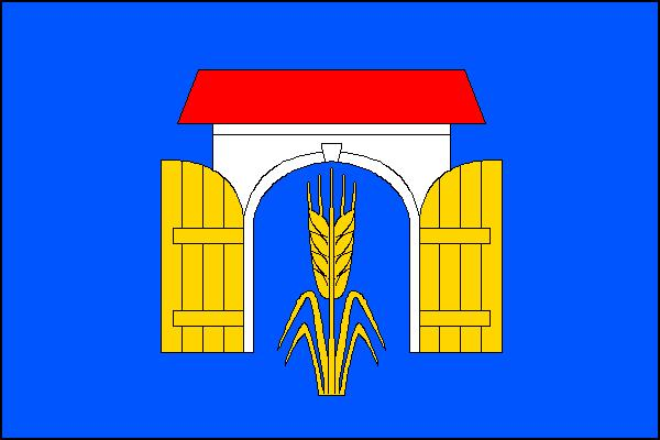 Vlajka obce Vrátno